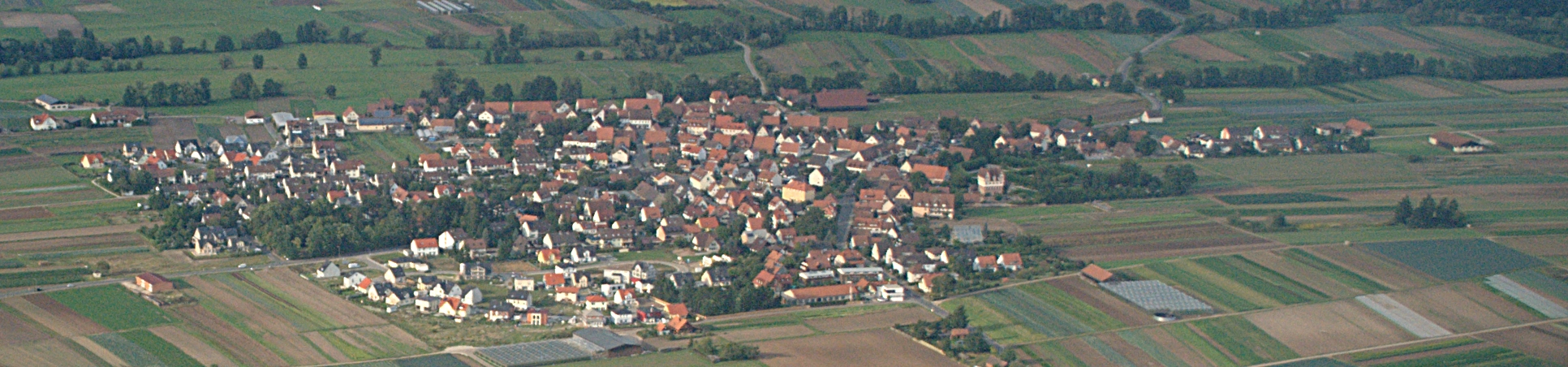 Luftaufnahme des Nürnberger Stadtteils Neunhof